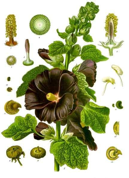 Stockrose. A blühender Stengel in natürl. Grösse; 1 Staubgefässröhre, vergrössert; 2 Blüthe im Längsschnitt, desgl.;3 Stempel, desgl.; 4 Fruchtknoten im Querschnitt, desgl.; 5 Staubgefässe, geöffnet, desgl.; 6 dasselbe, geschlossen, desgl.; 7 Pollenkorn, desgl.; 8 Frucht mit Fruchtkelch, natürl. Grösse; 9 dieselbe ohne Fruchtkelch, desgl.; 10 einzelne Früchtchen, desgl.; 11 eins dergl., vergrössert; 12 dasselbe zerschnitten, von der Breitseite, desgl.; 13 dasselbe zerschnitten, von der schmalen Seite, desgl.; 14 Same, natürl. Grösse und vergrössert.